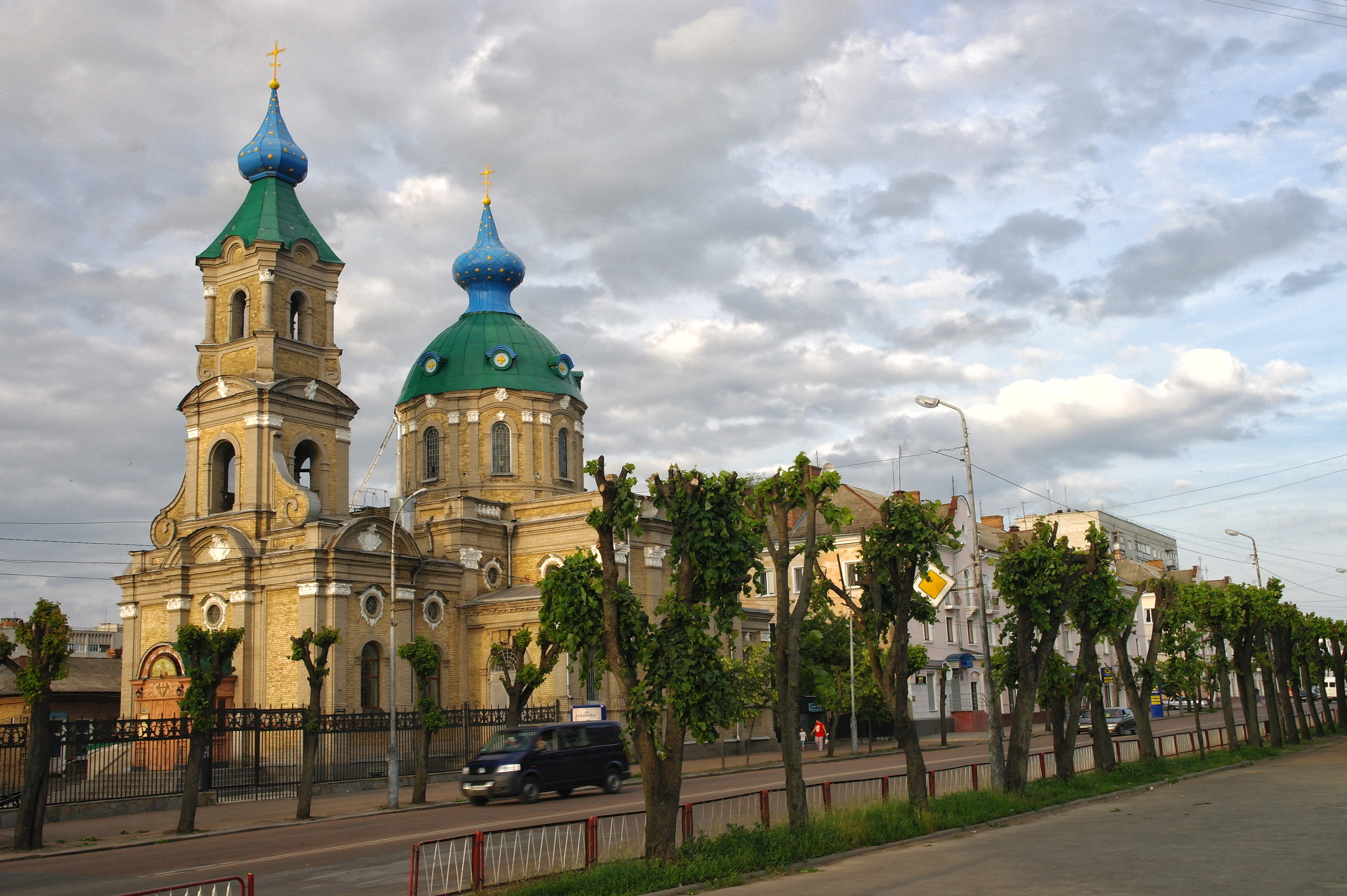 Бердичів, Нікольська церква